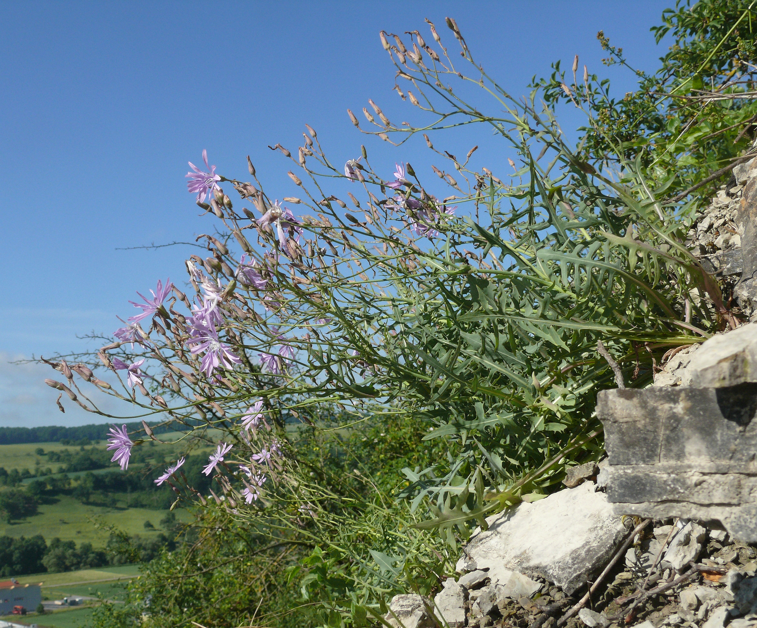 Lactuca perennis, Hohenlohe, Deutschland